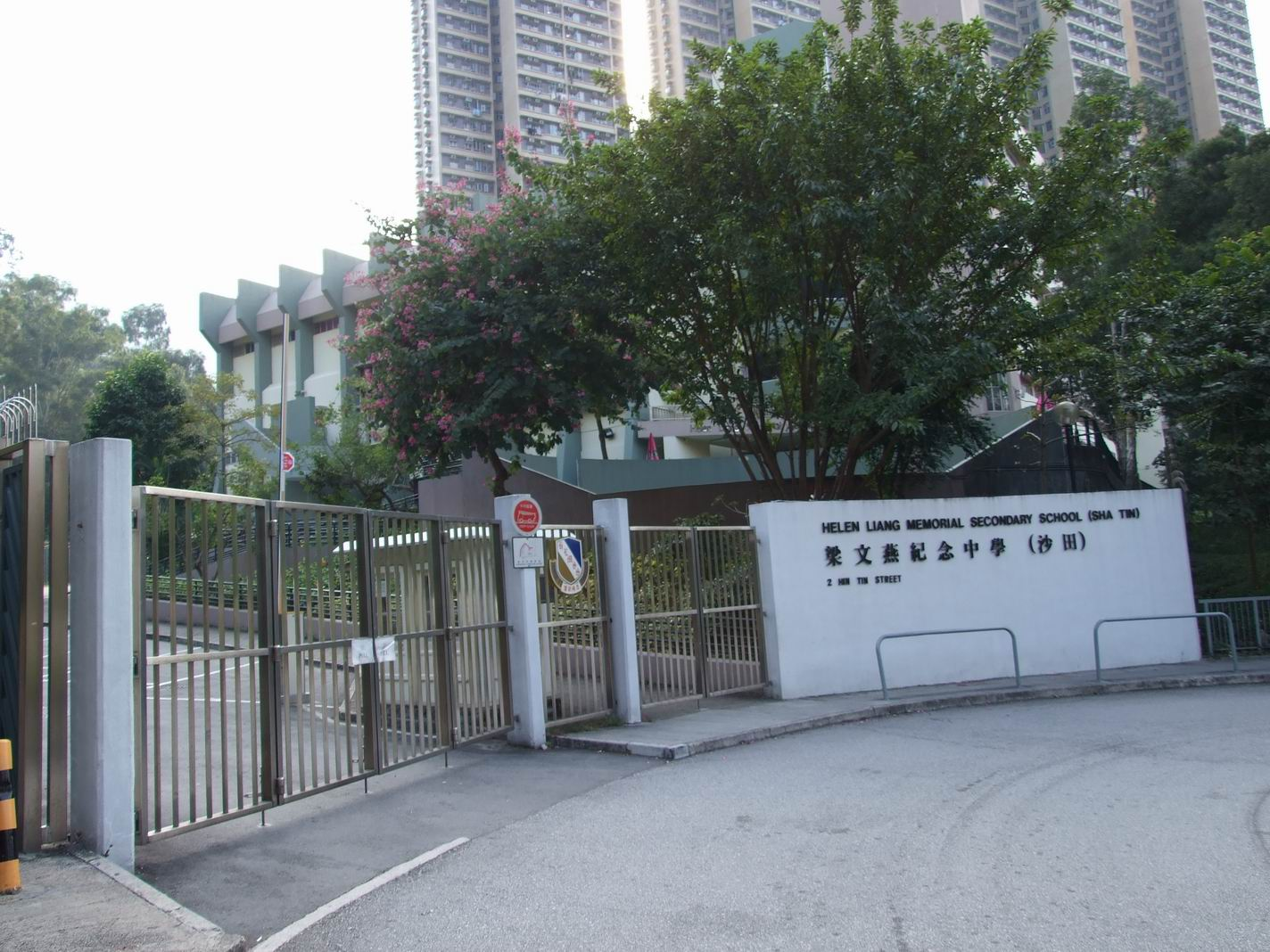 梁文燕紀念中學（沙田）